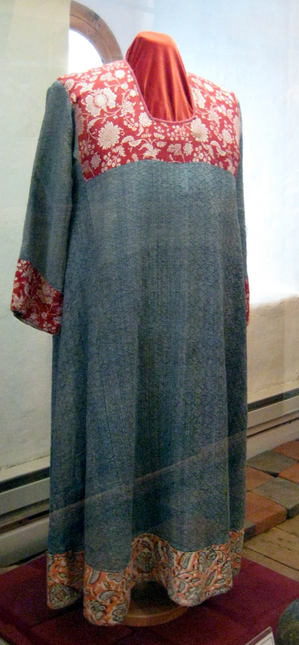 Подризник. Начало 20 века. Из церкви Ризоположения. Ферапонтов монастырь